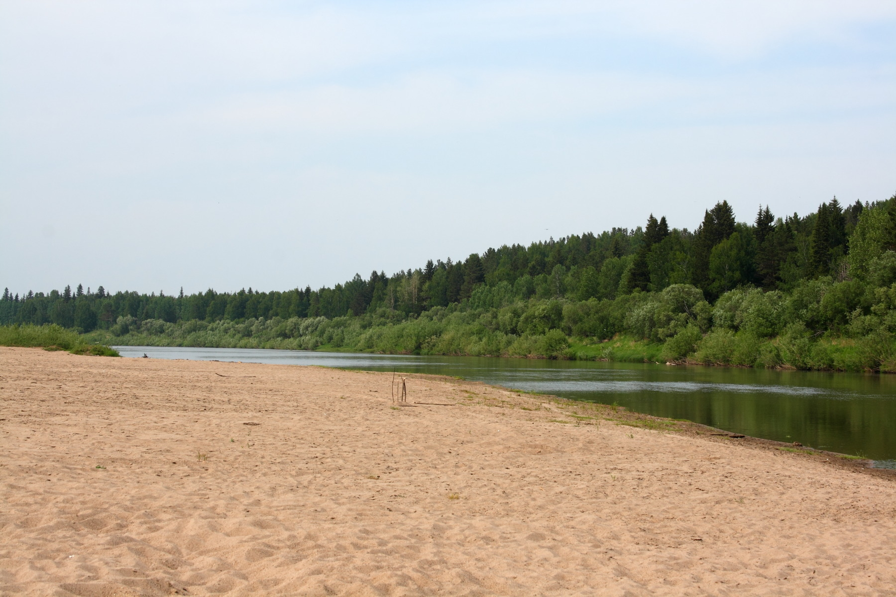 Яя